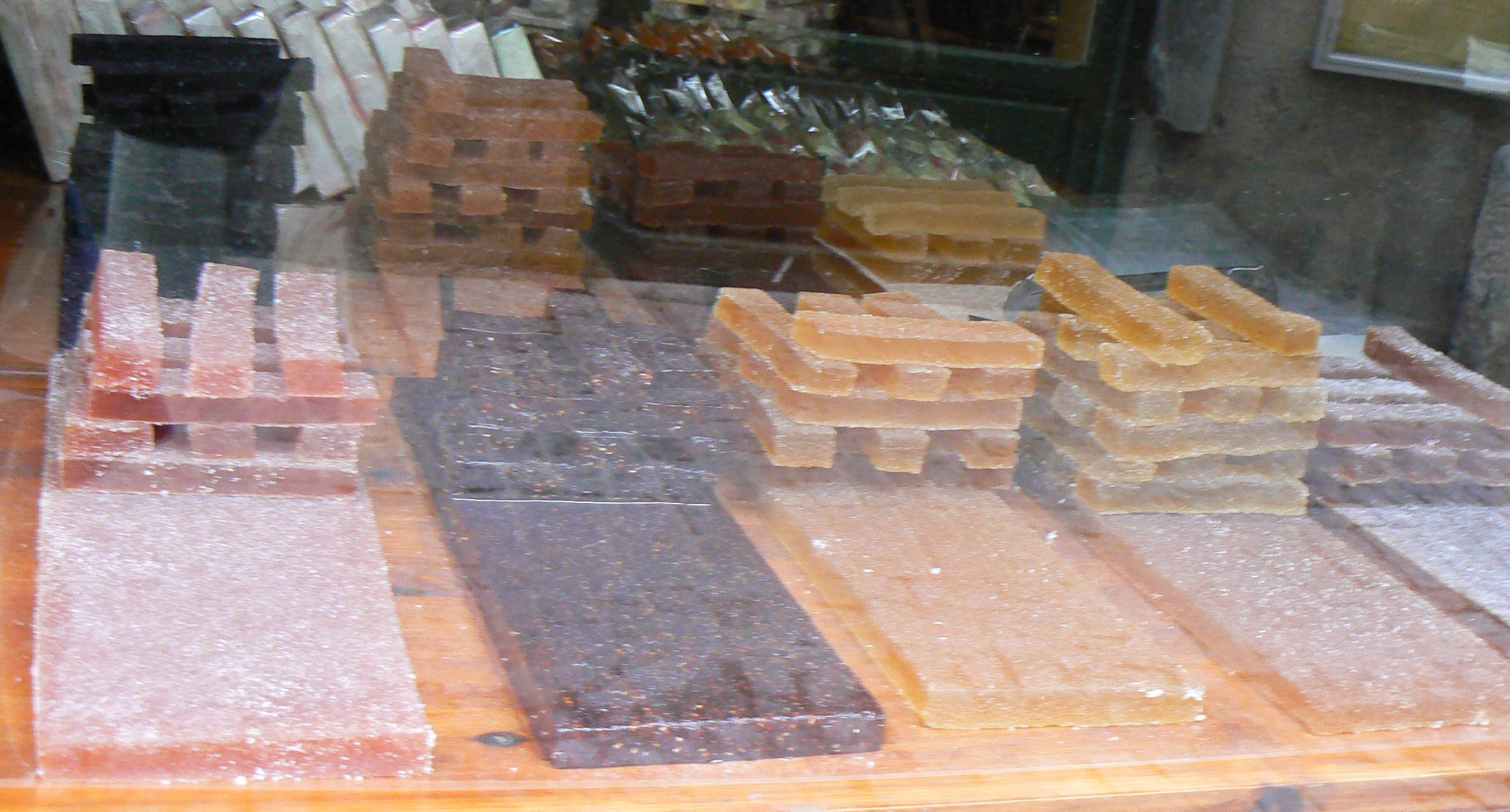 Codonyats de fruites diferentes (de codony, de mandarina, de maduixa, etc.) a Carcassona.